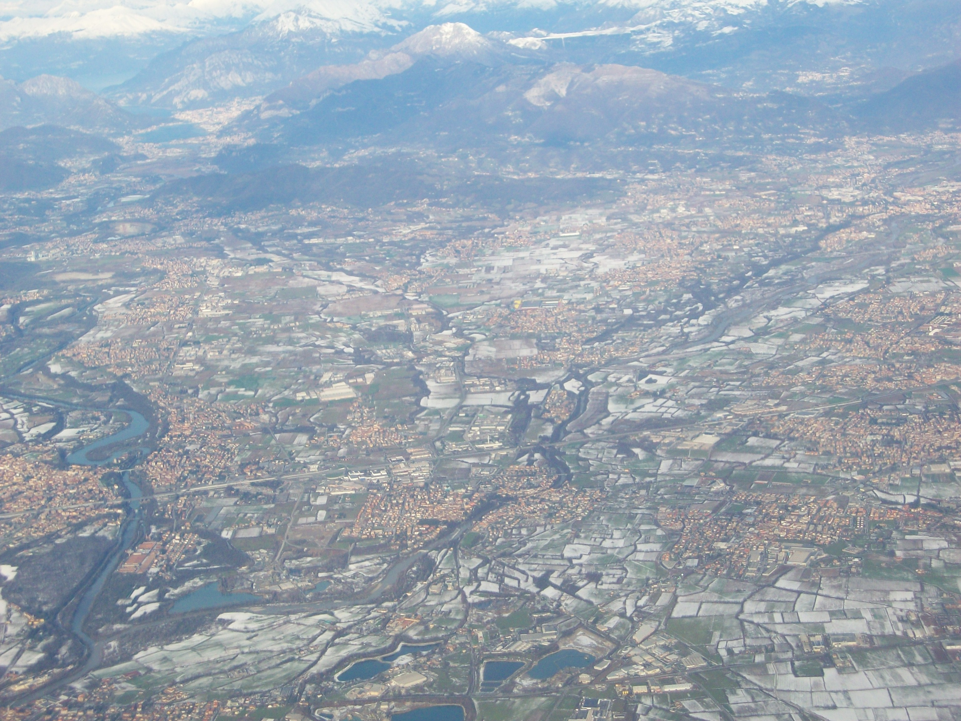 Visuale aerea dell'Isola Bergamasca